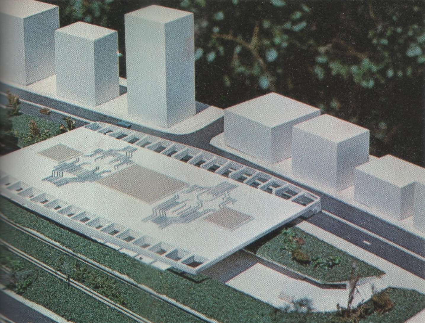 Vista parcial da primeira maquete da Nova Biblioteca Pública (base para o futuro Centro Cultural São Paulo), apresentada em meados de 1978 pelos arquitetos Eurico Prado Lopes (1940-1985) e Luiz Benedito de Castro Telles (1943-2014).